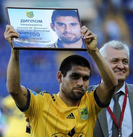 Крістіан Вільягра — аргентинський футболіст з дипломом в честь проведення 100 матчів за «Металіст» (Харків).